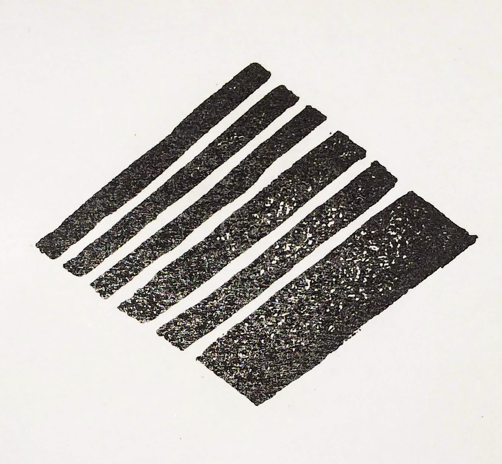 曽根崎新地（北新地）紋章